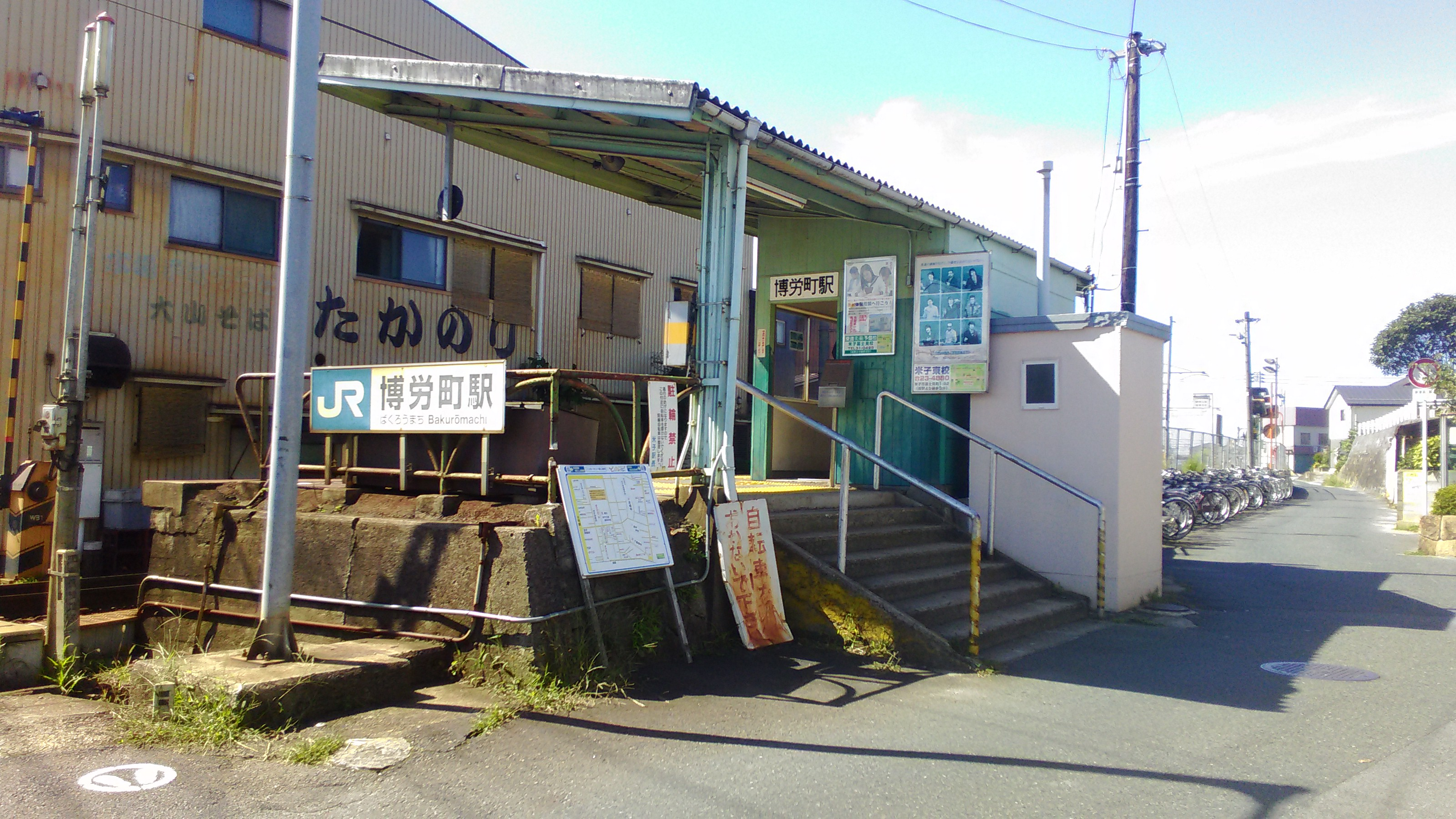 JR西日本境線博労町駅